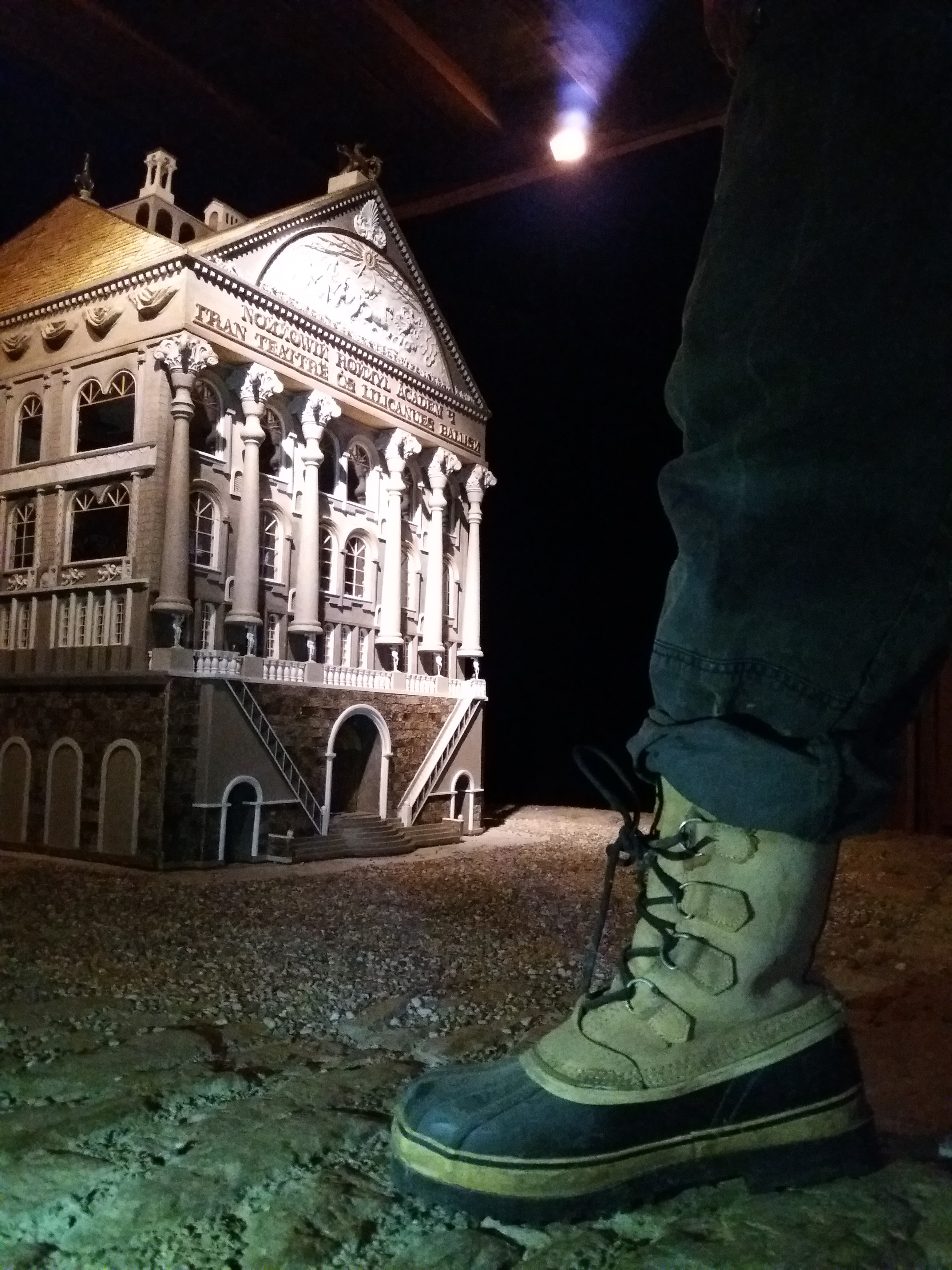 Das Lilicanischer Puppentheater